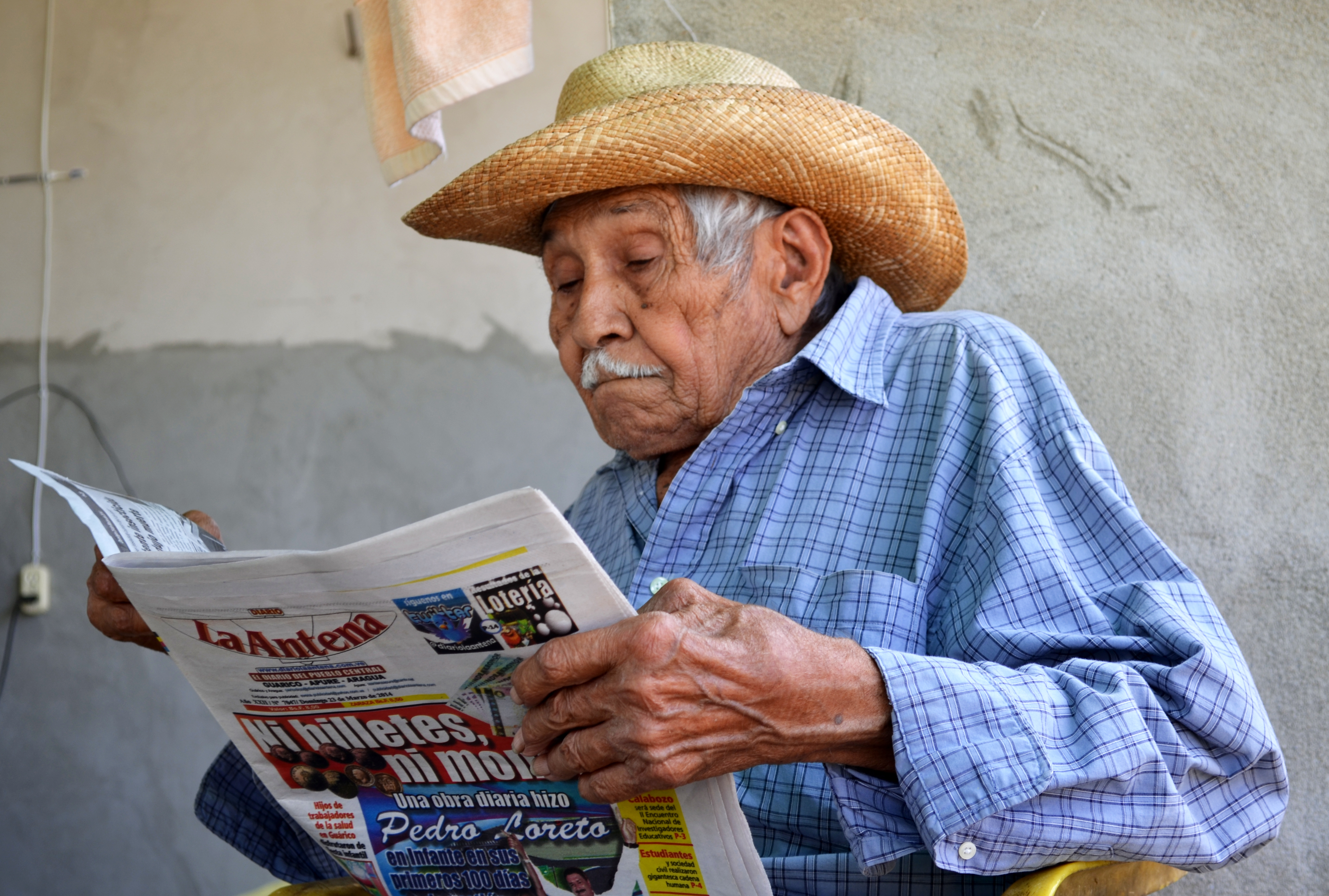 La camisa a cuadros, el sombrero,son elementos característicos de un llanero. Así descansa éste luego de una larga jornada de trabajo en la sabana guariqueña.